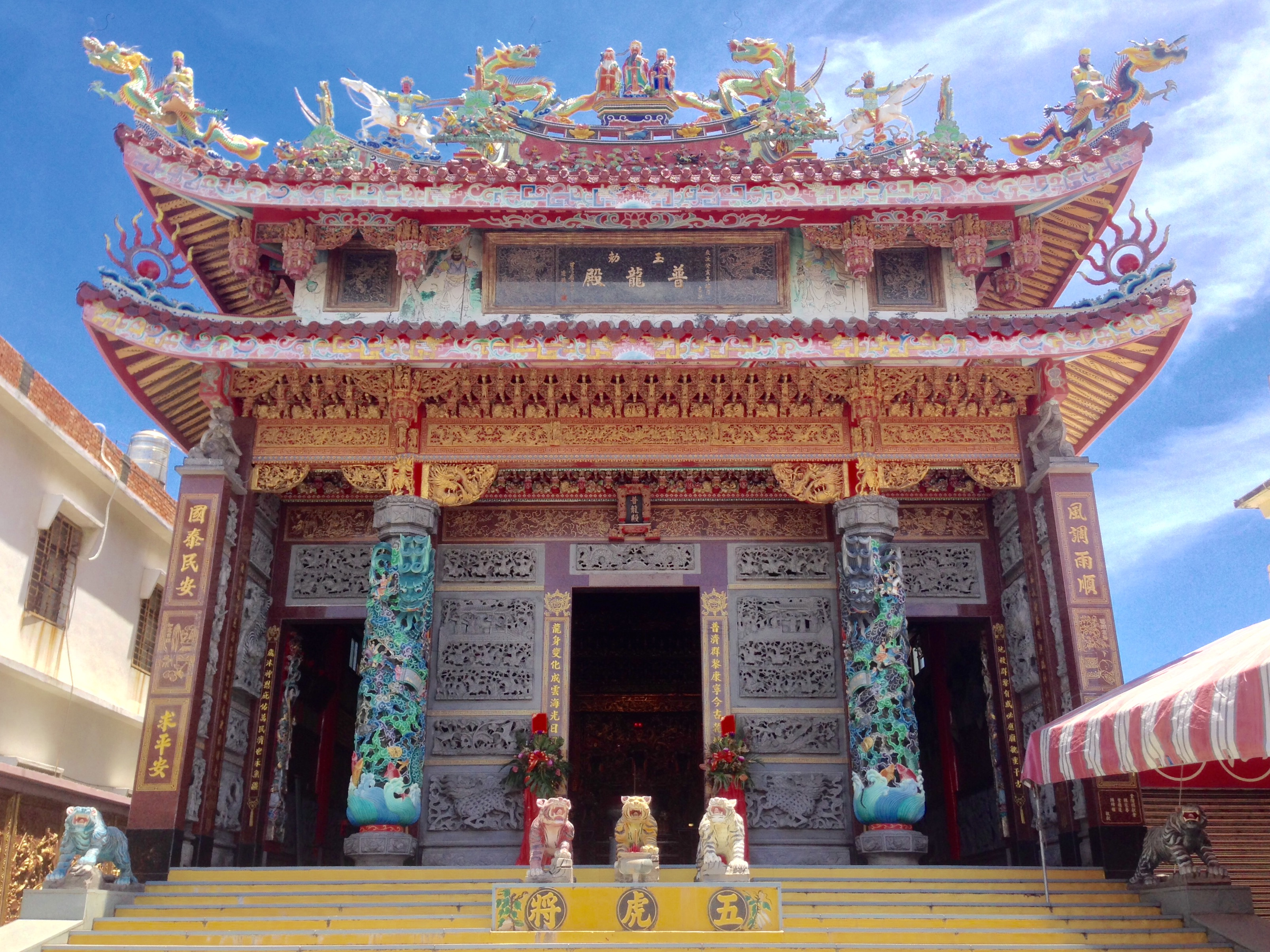 中文（台灣）: 放索普龍殿